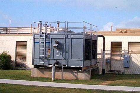 Instalación de frío industrial